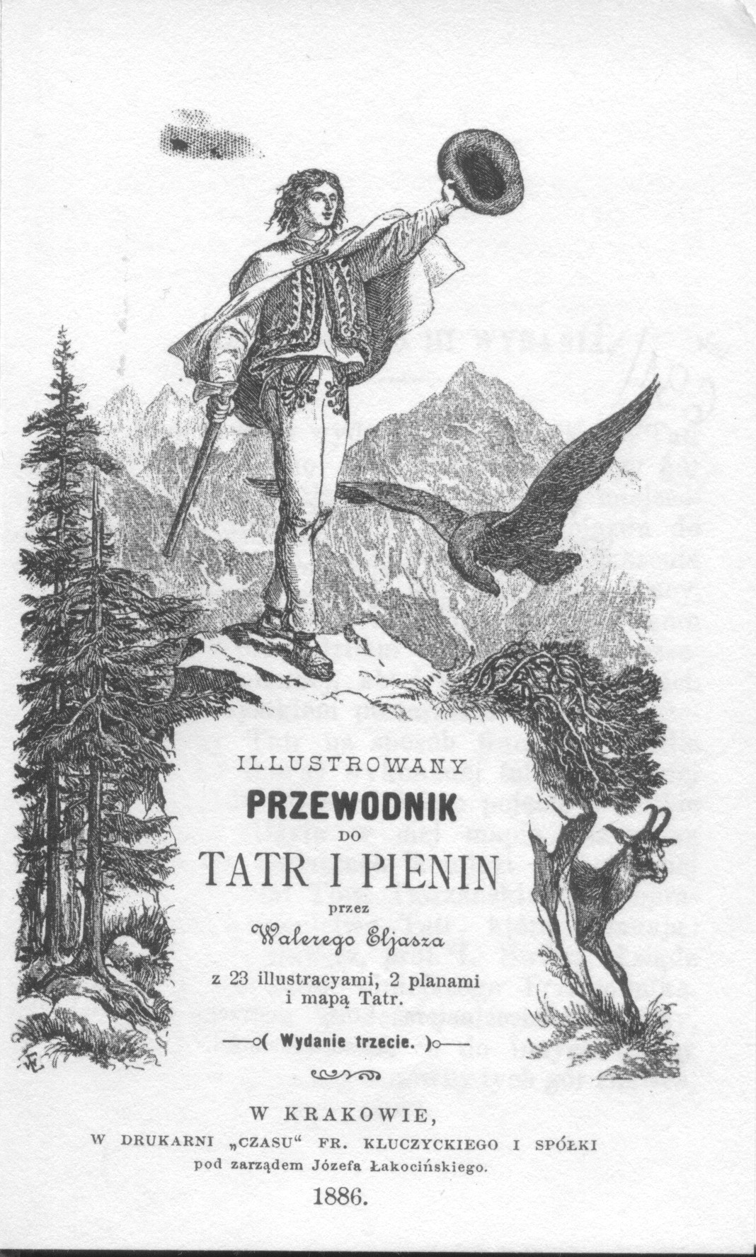 Przewodnik po Tatrach i Pieninach Autor: Walery Eljasz Radzikowski Licencja: Licencja: Przewodnik wydany w 1886 a autor zmarł w 1905 roku